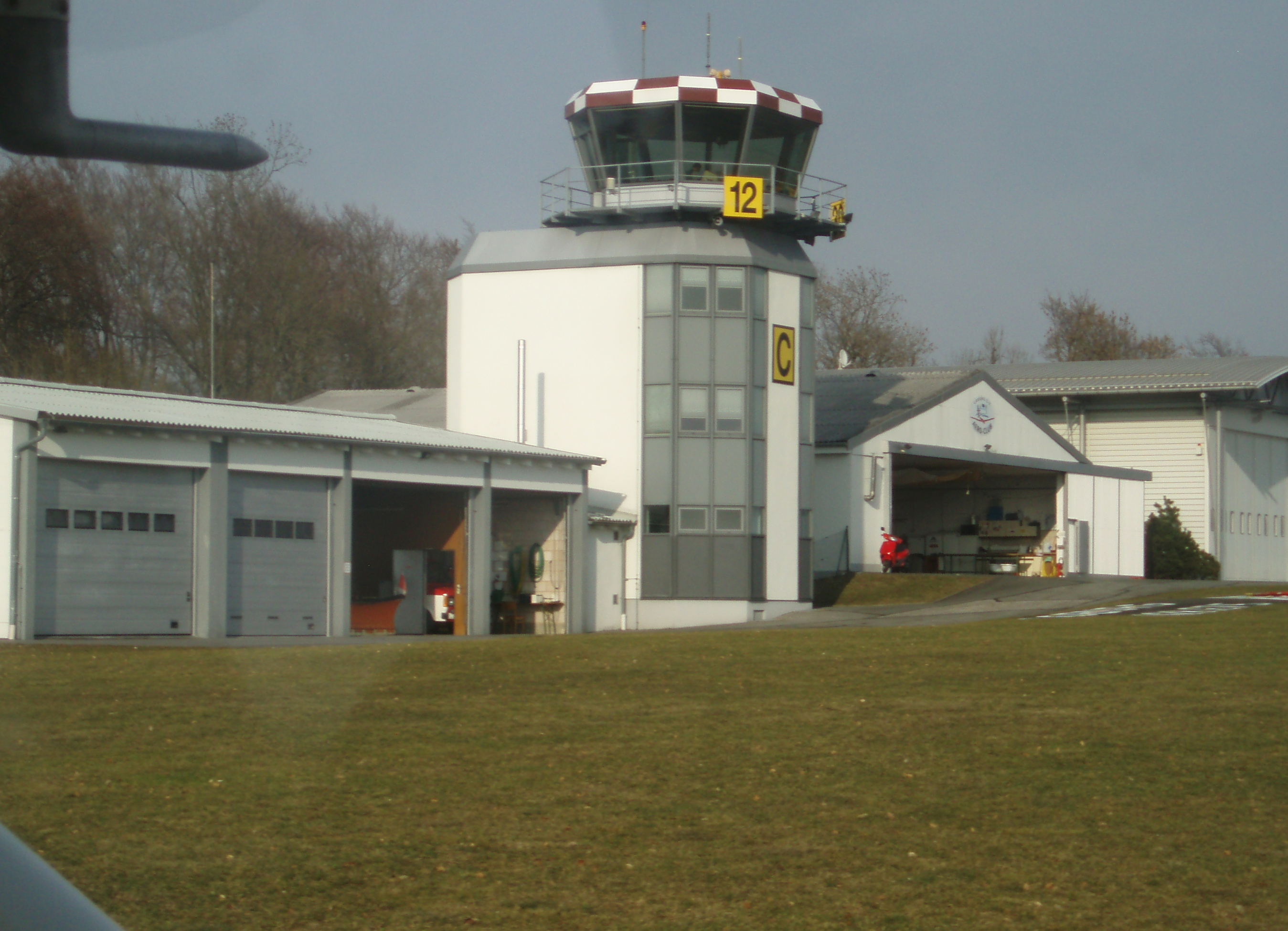 Rundflug 14. März 2009, Kamera 3 (Olympus Digital), Bild 52 (original p31400054.jpg) nachbearbeitet: Drehung